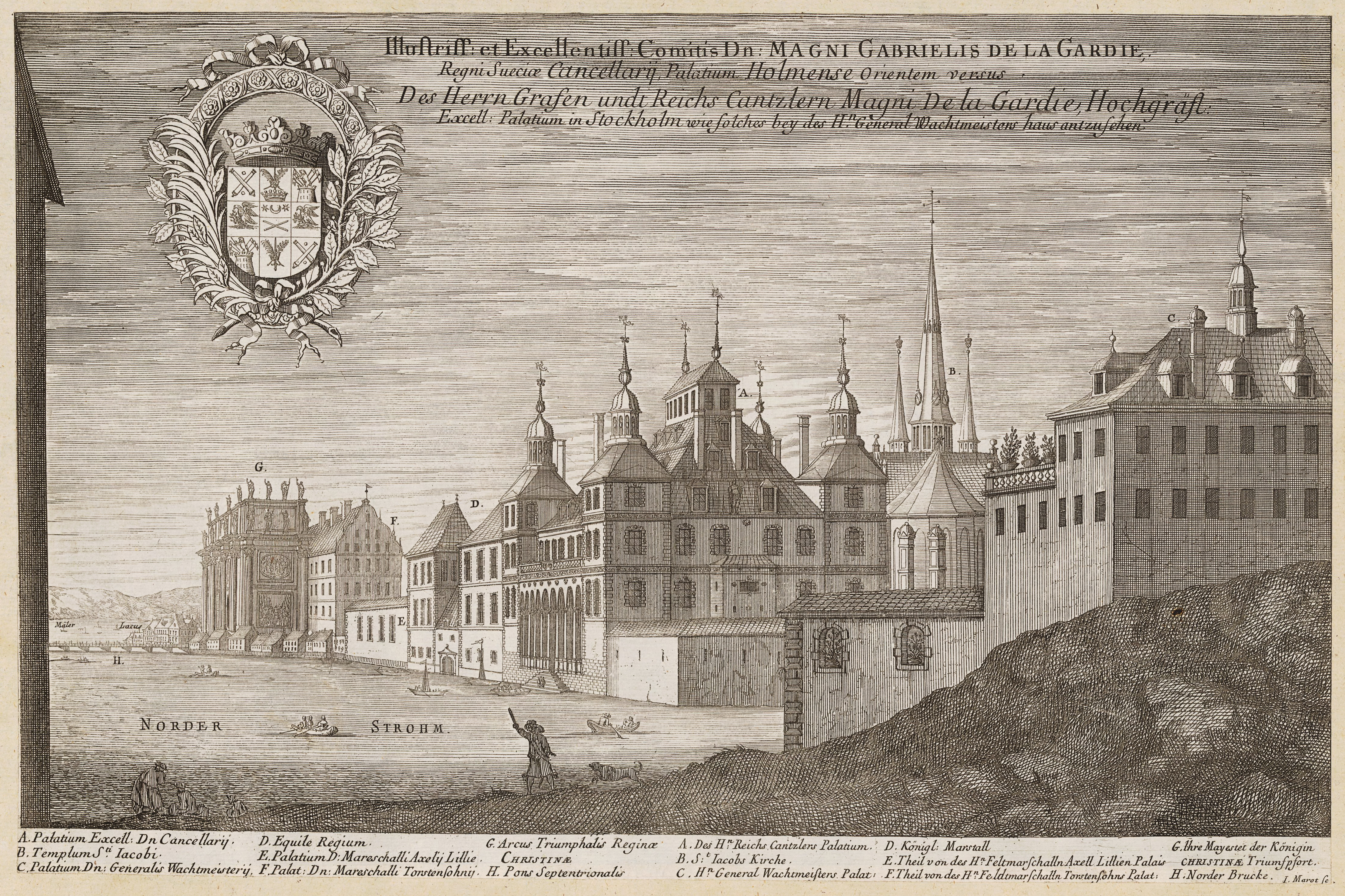 Illustriss: et Excellentiss: Comitis Dn: Magni Gabrielis De la Gardie, Regni Sueciæ Cancellarij, Palatium Holmense Orientem versus [Bild] : Des Herrn Grafen undt Reichs Cantzlern Magni De la Gardie Hochgräfl: Excell: Palatium in Stockholm, wie solches bey des H:n General Wachtmeisters haus antzusehen. / I. Marot sc.